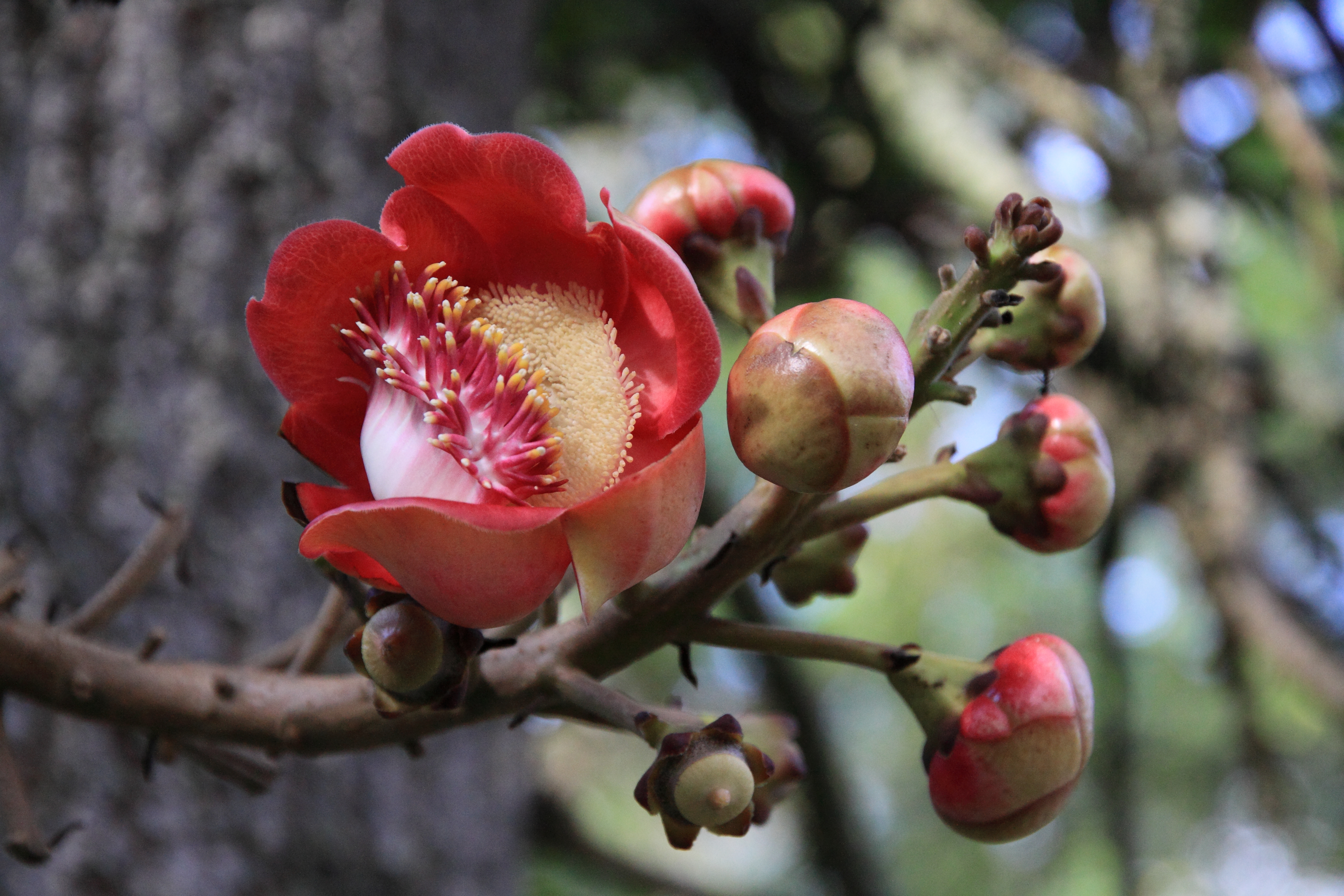 Jardim Botânico do Rio de Janeiro - abricó-de-macaco